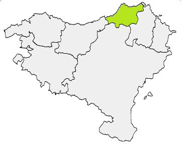 Stuación del Labort en Vasconia.